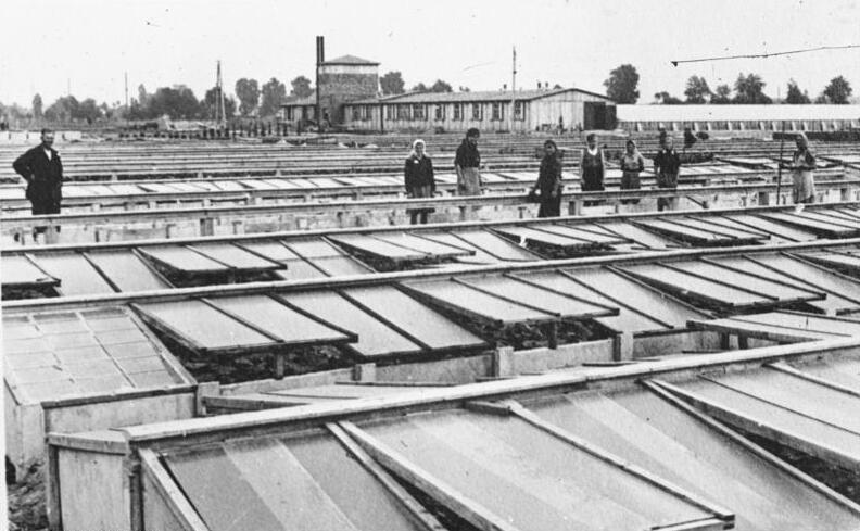 46 Werksgärtnerei